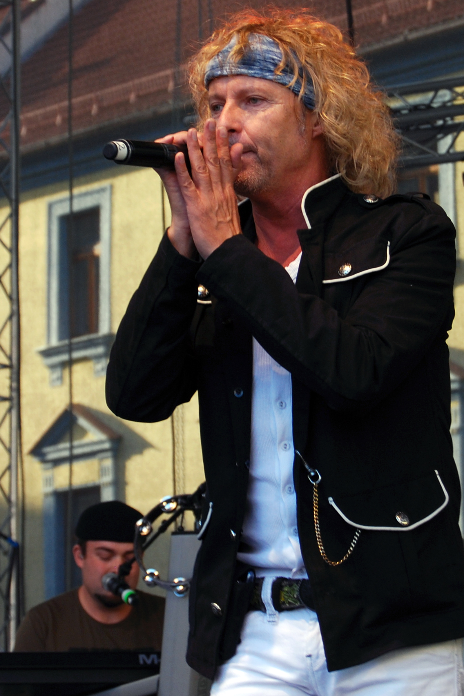 Peter Nagy a skupina Indigo. Městská slavnost Dotkni se Písku 2014. Velké náměstí. Písek. Jihočeský kraj. Česká republika.